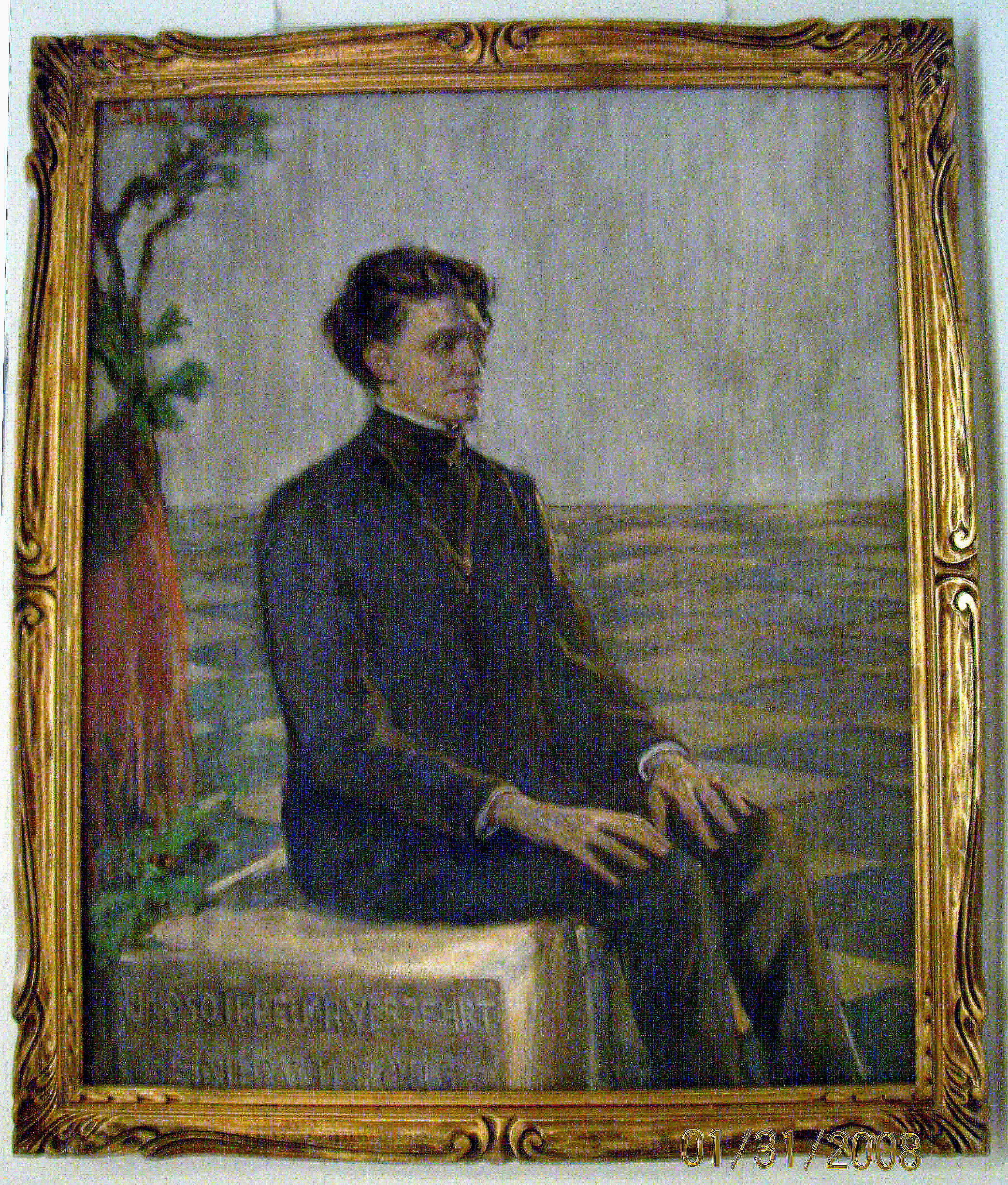 Gemälde von Sabine Lepsius mit Stefan George